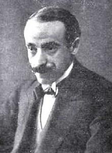 El escritor Gregorio Martínez Sierra